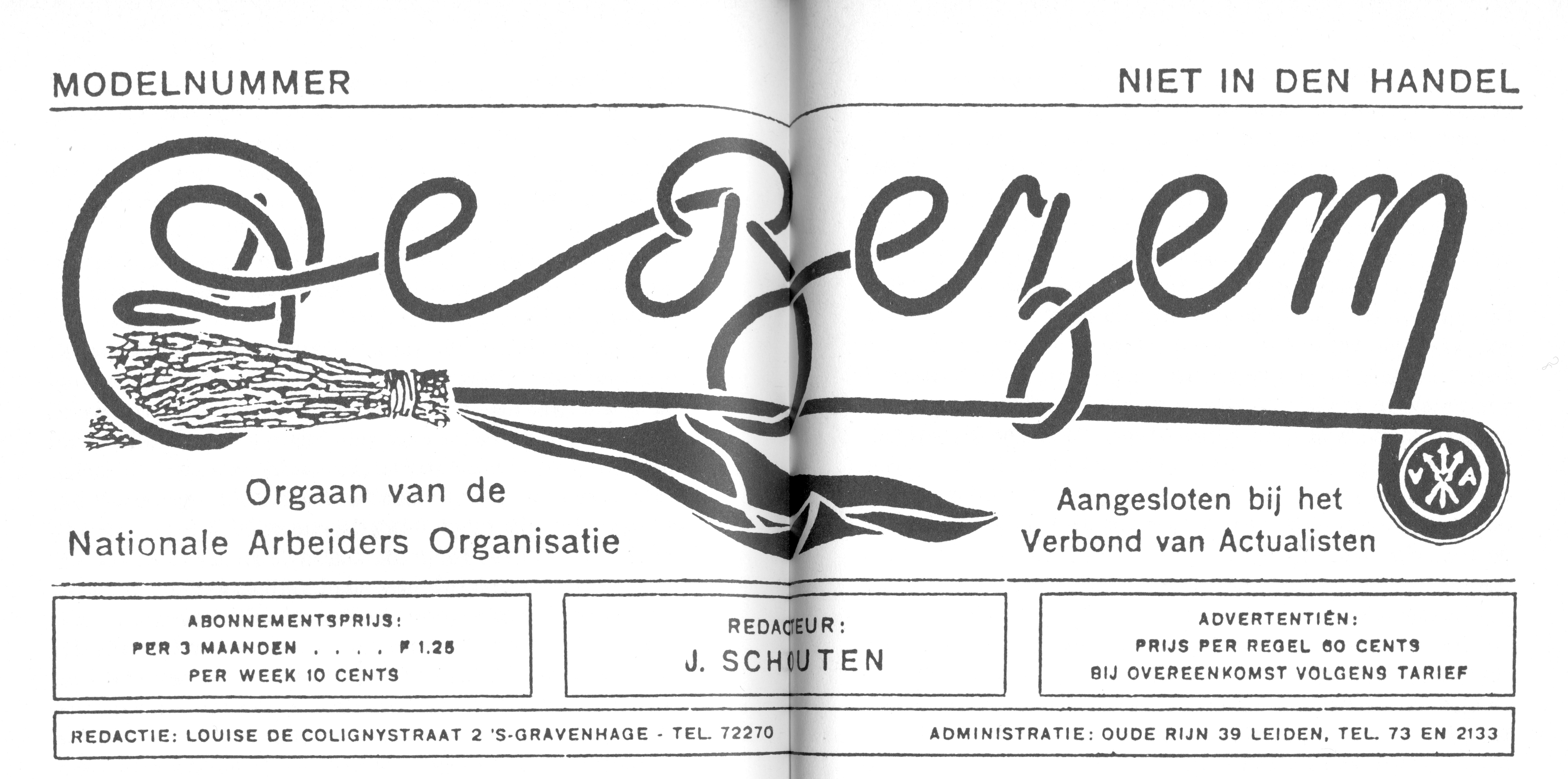 Blad gepubliceerd in het voorjaar van 1925, derhalve in het publieke domein geplaatst.